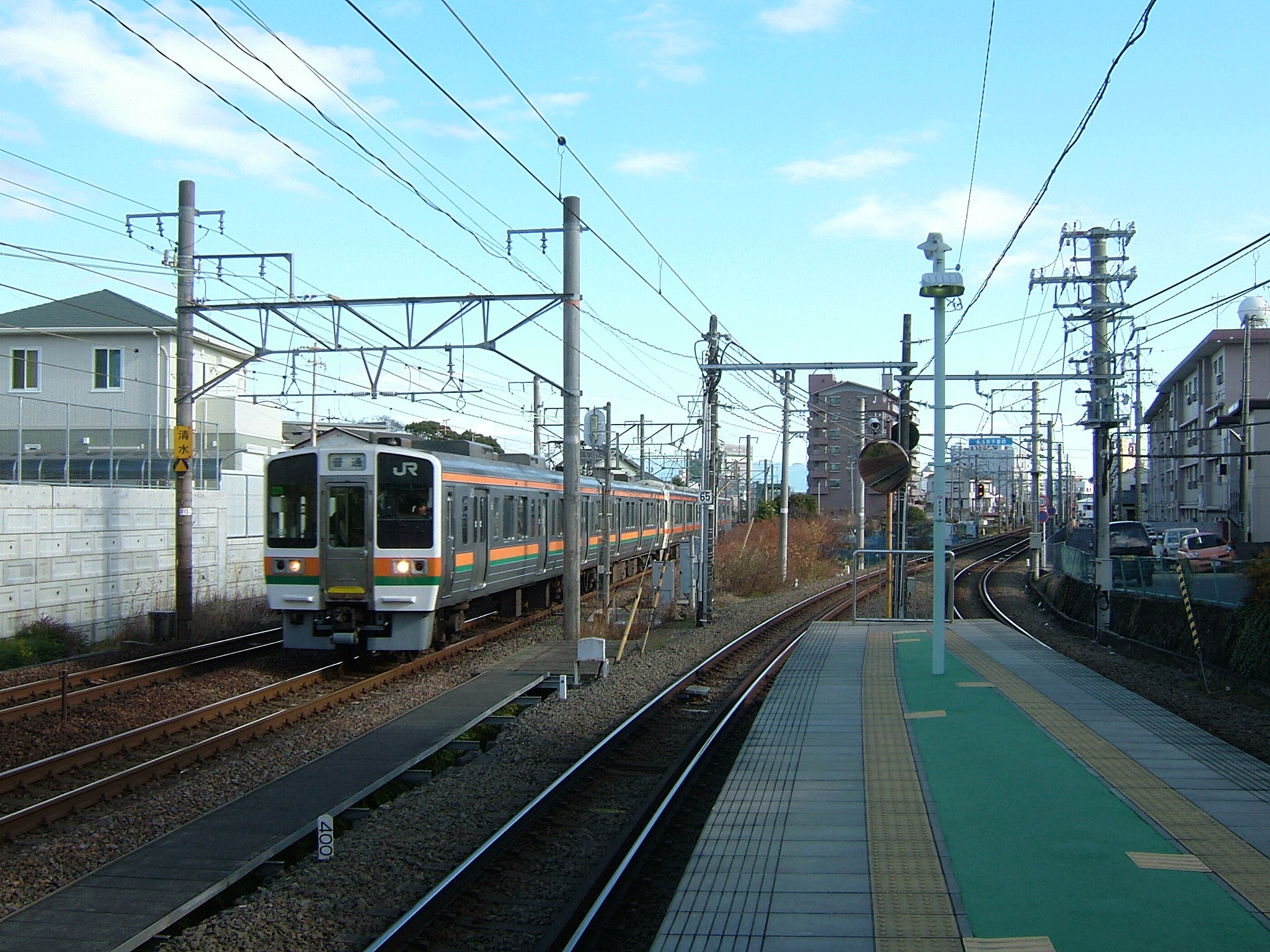 静鉄入江岡駅と東海道本線